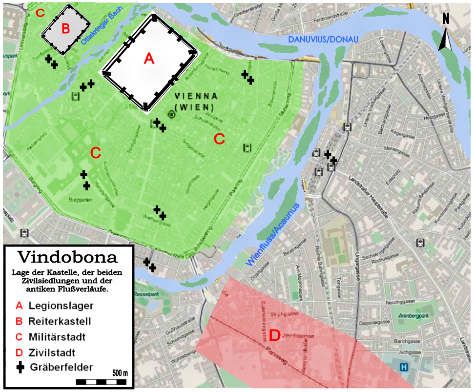 Lageskizze der römischen Kastelle, der beiden Zivilsiedlungen von Vindobona (Wien/Österreich) und der antiken Flussverläufe.